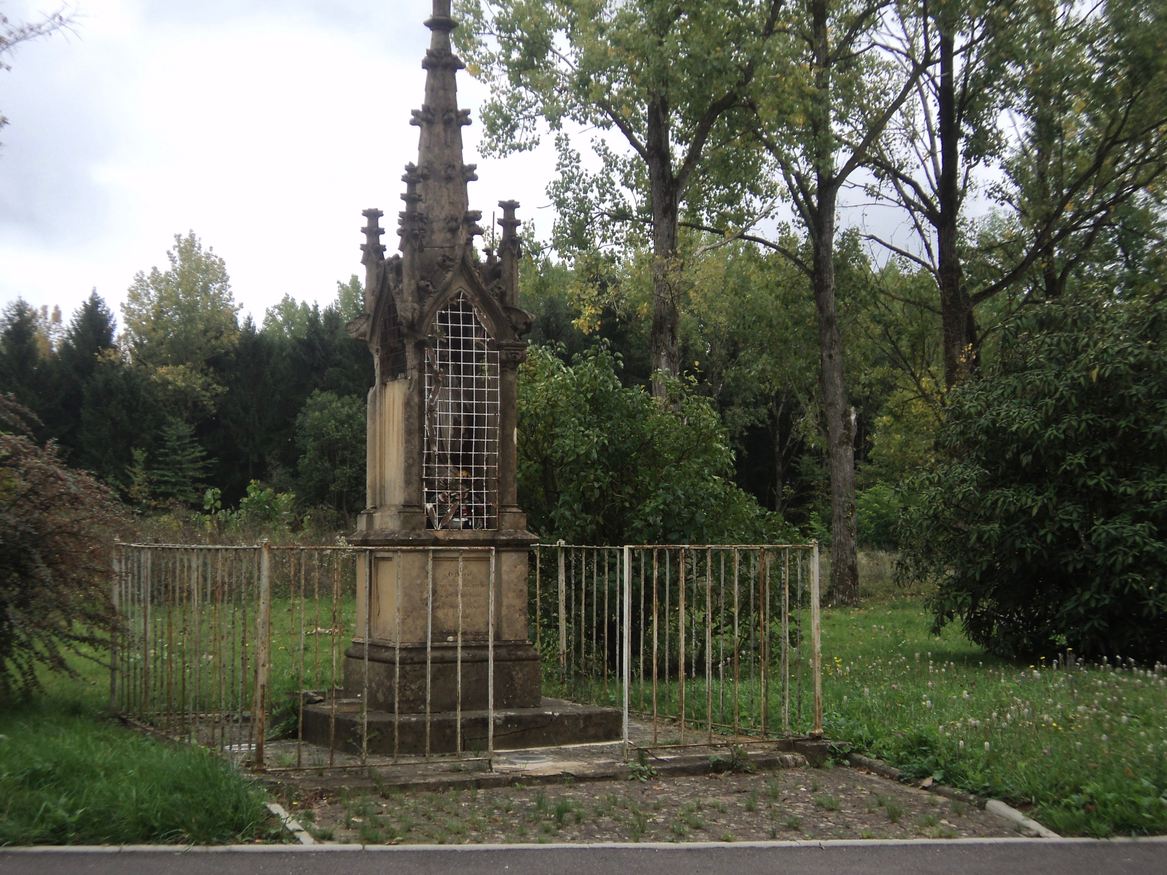 Tucquegnieux plateau la madonne